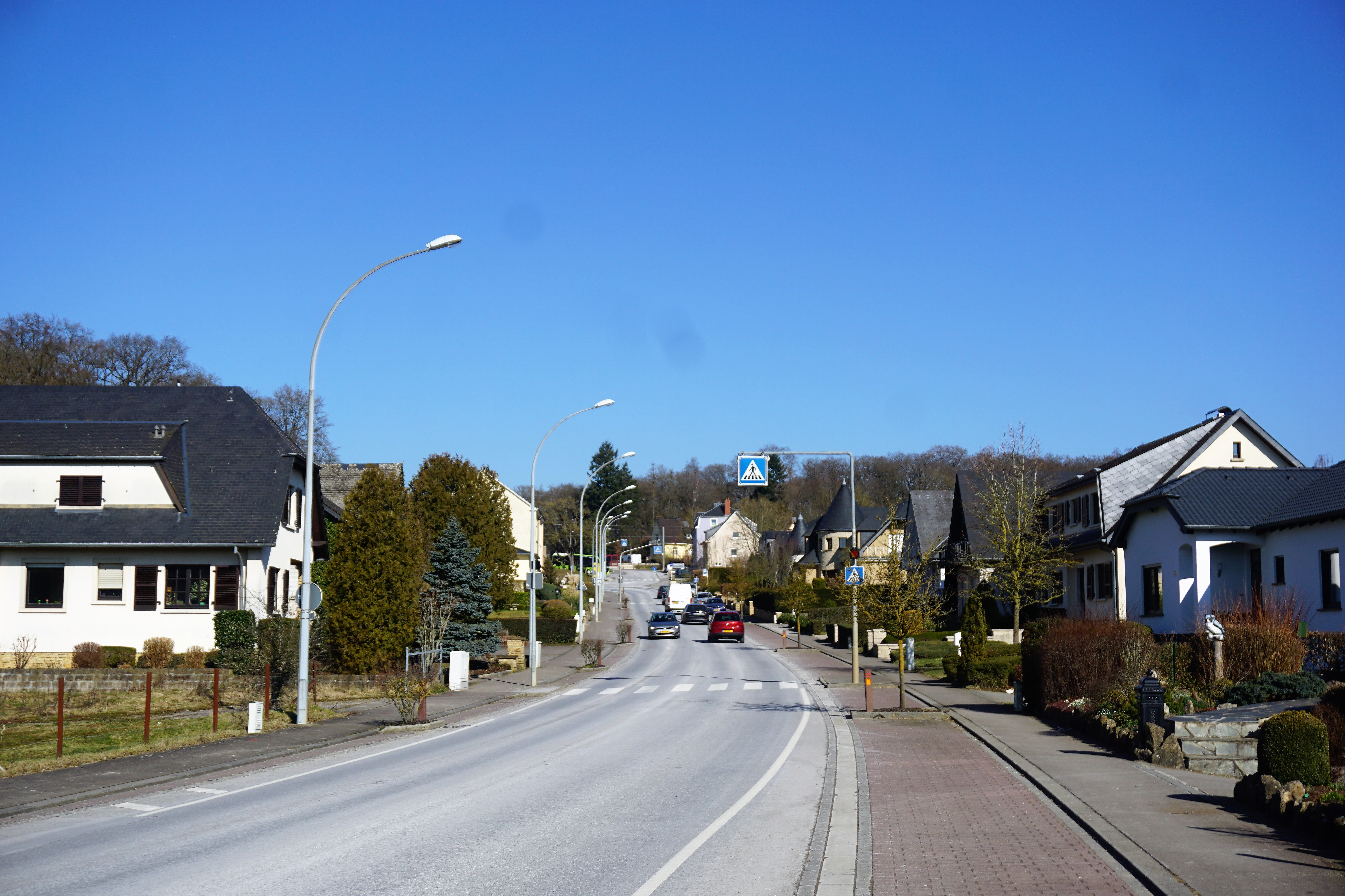 Leudelange, lieu-dit Leidelenger Gare. Le CR163 en direction nord.